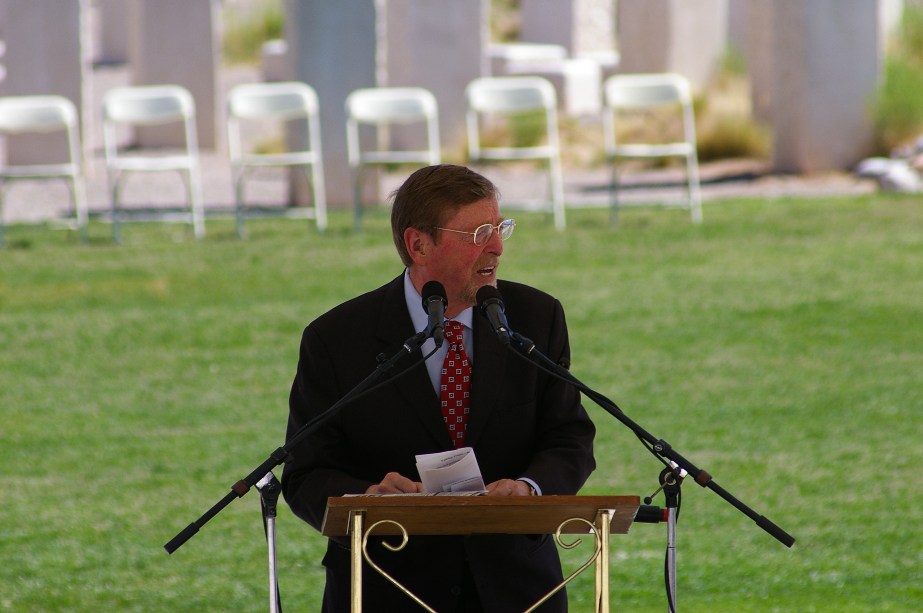 Sen. Pete Domenici speaks at Albuquerque Memorial day event.